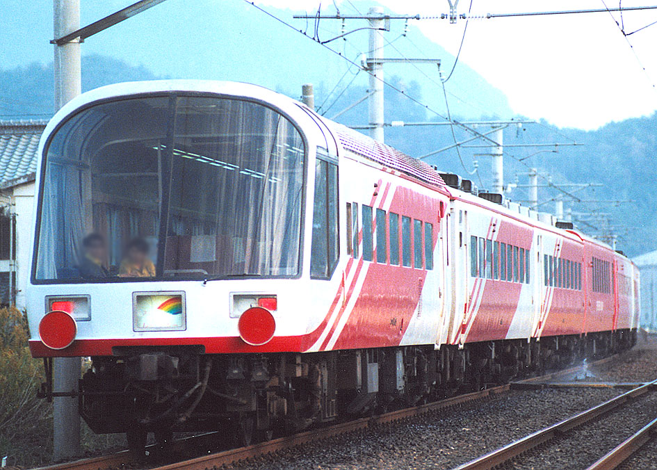 JR東日本 14系欧風客車 スーパーエクスプレスレインボー